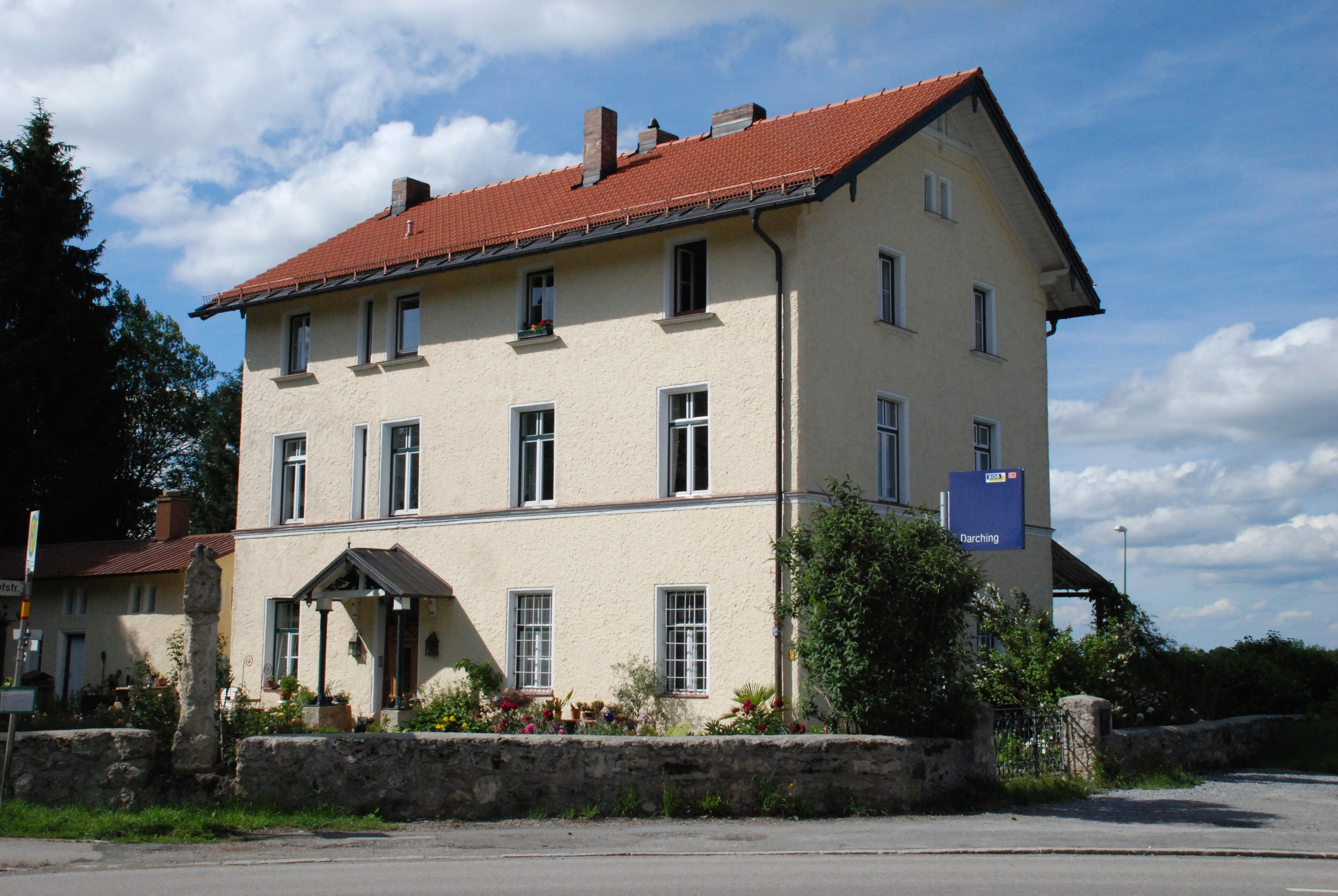 Bahnhof Darching an der Bahnstrecke Holzkirchen-Miesbach in Mitterdarching, Gemeinde Valley, Landkreis Miesbach, Regierungsbezirk Oberbayern, Bayern.